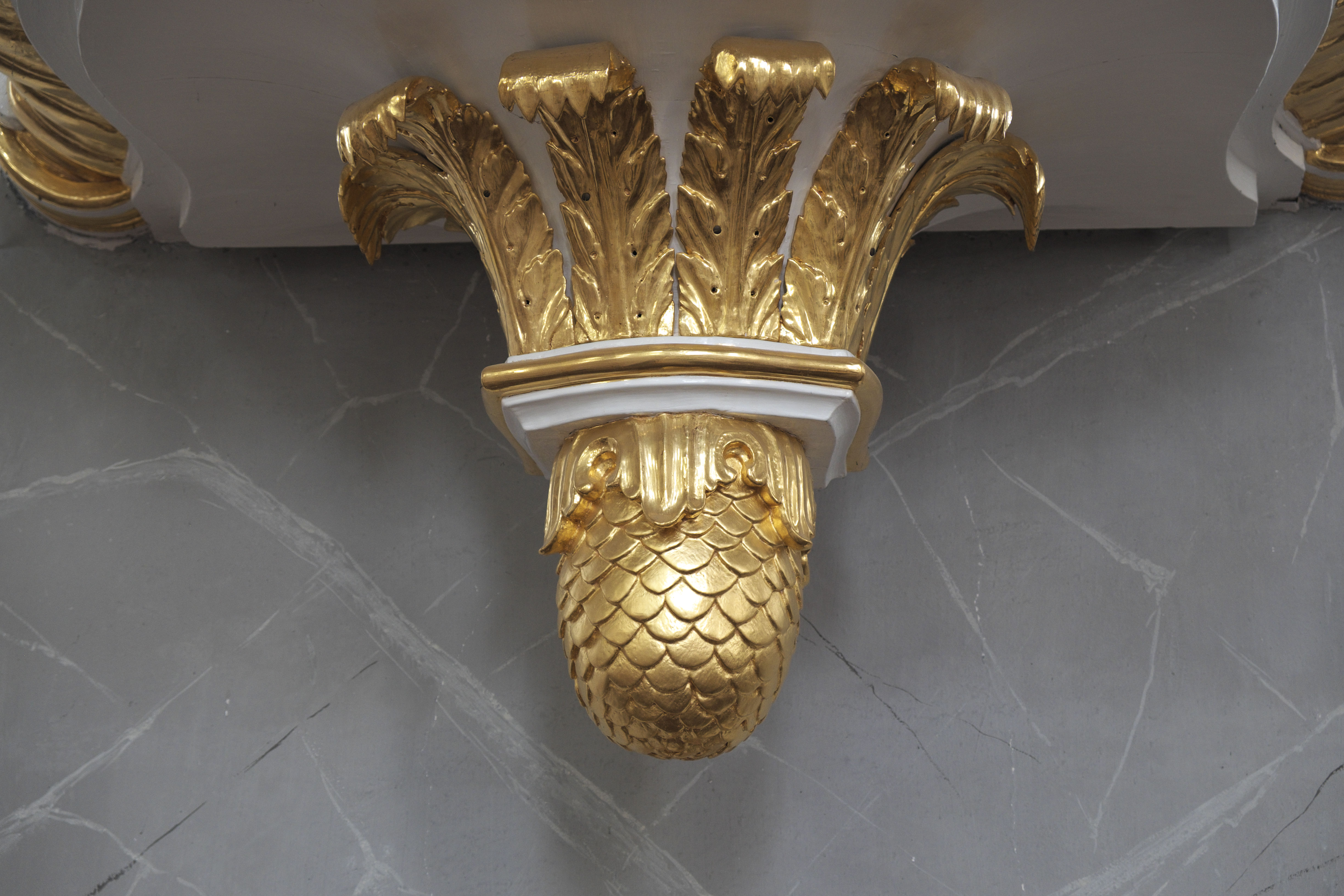 Katholische Pfarrkirche Mariä Heimsuchung in Lechbruck am See im Landkreis Ostallgäu (Bayern/Deutschland), Dekor am Kanzelkorb